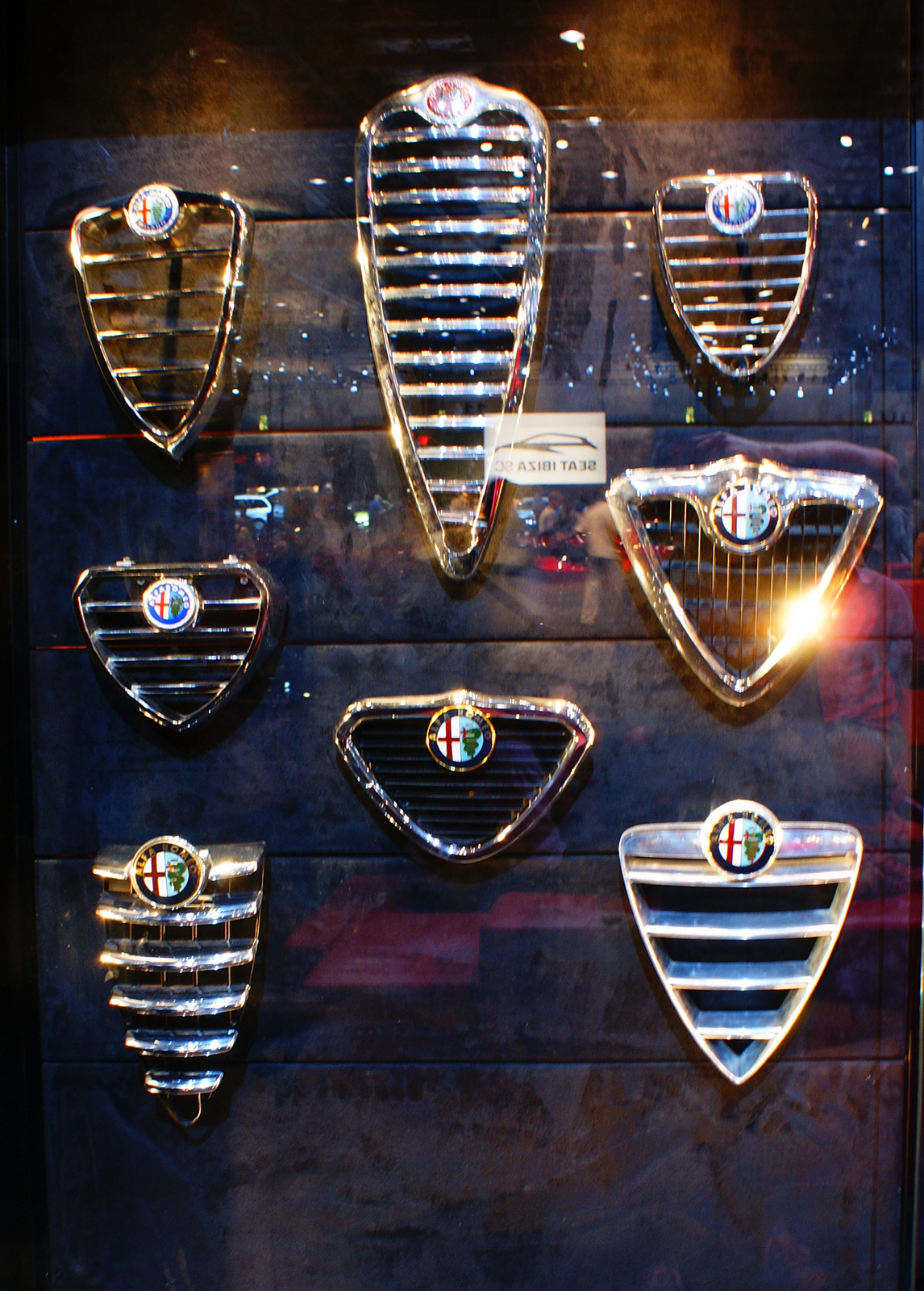 Alfa grills Template:Dslr-a200